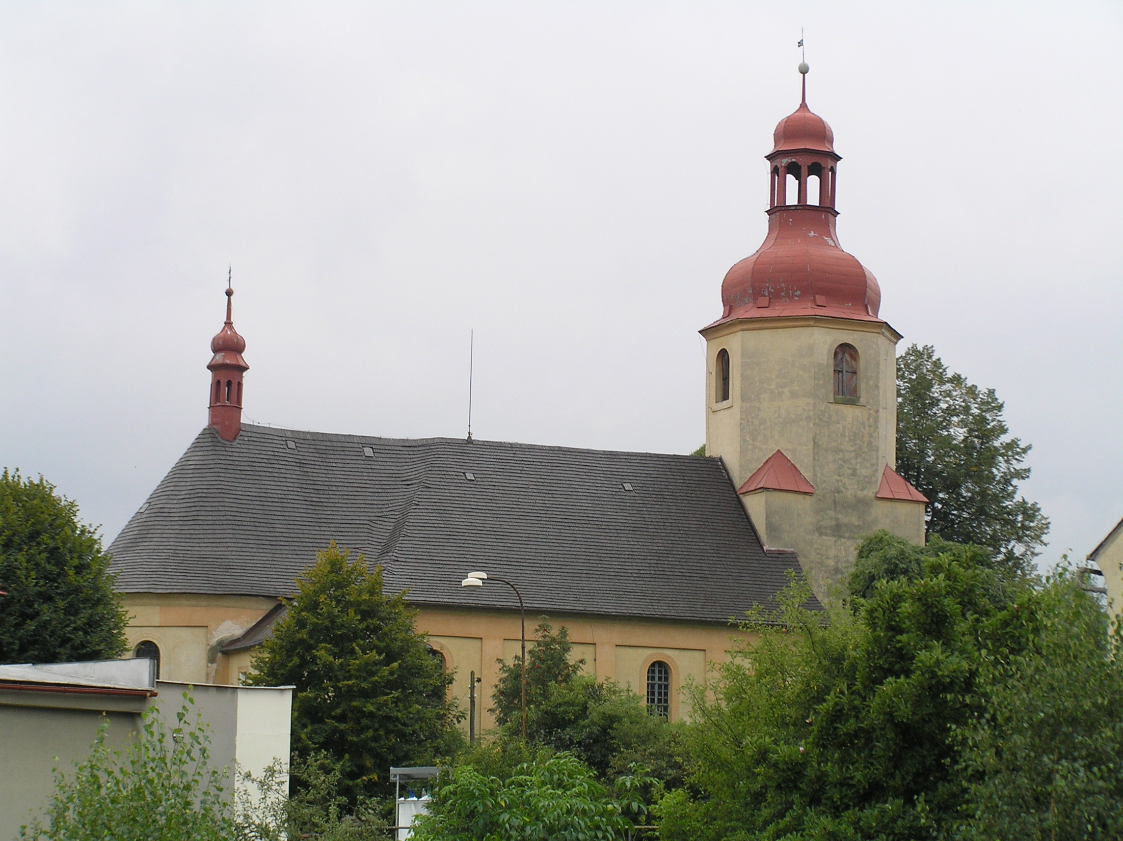 Kostel Nejsvětější Trojice, Bzí (Železný Brod).